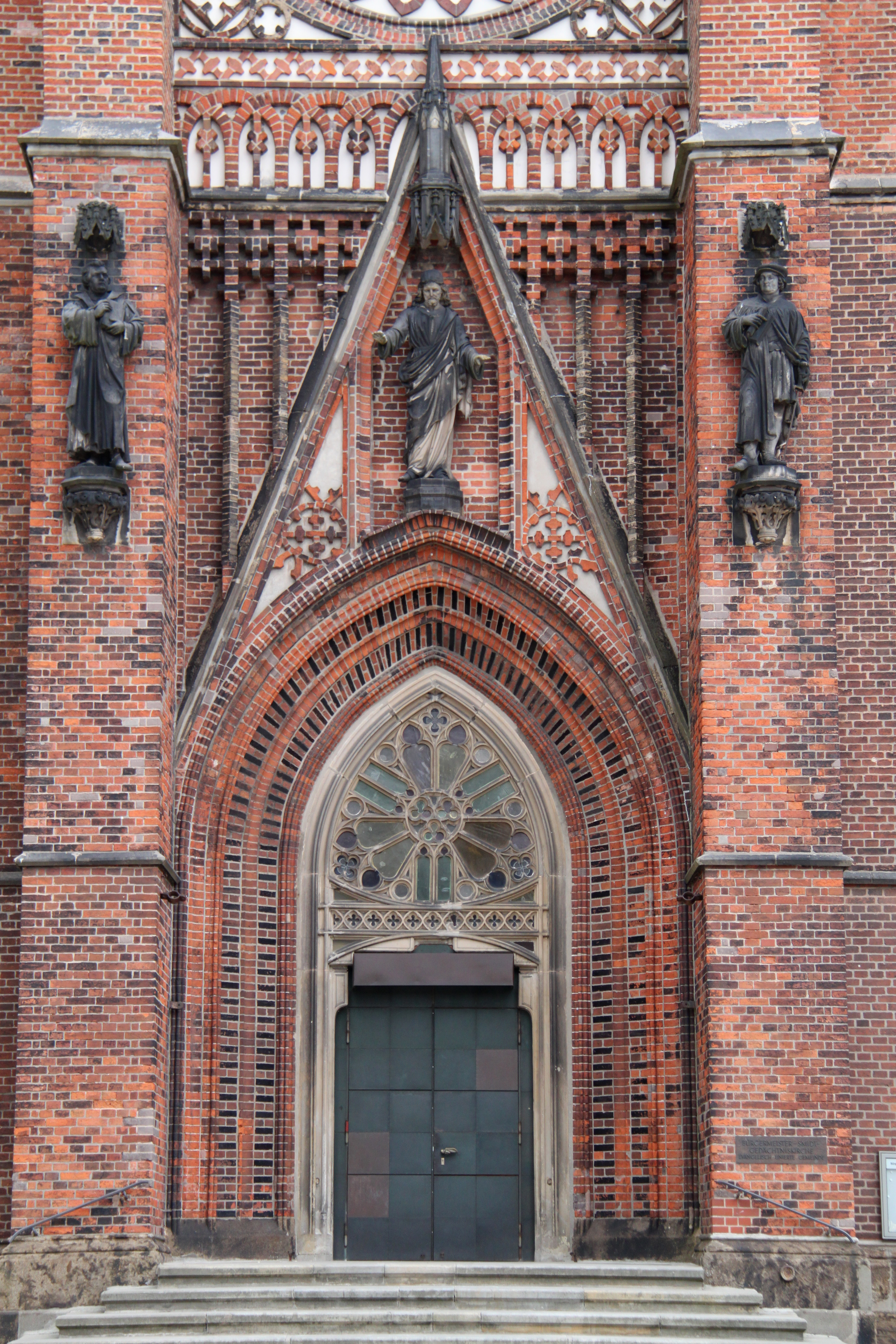 Bremerhaven 2010Das abgebildete Objekt ist ein geschütztes Kulturdenkmal in der Freien Hansestadt Bremen, mit der Nr. 1530 beim Landesamt für Denkmalpflege registriert.